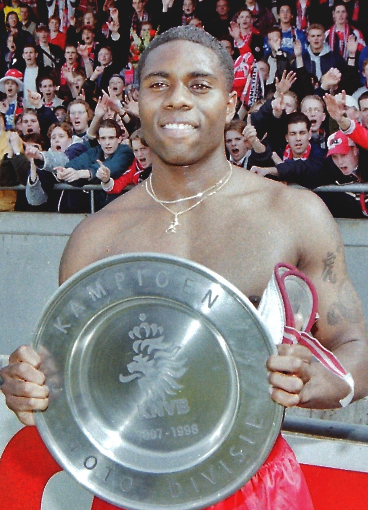 Amani Dove, gemaakt bij het Kampioenschap van AZ